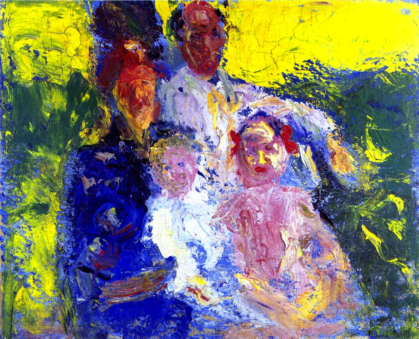 Die Familie Schönberg, Gmunden, late July 1908